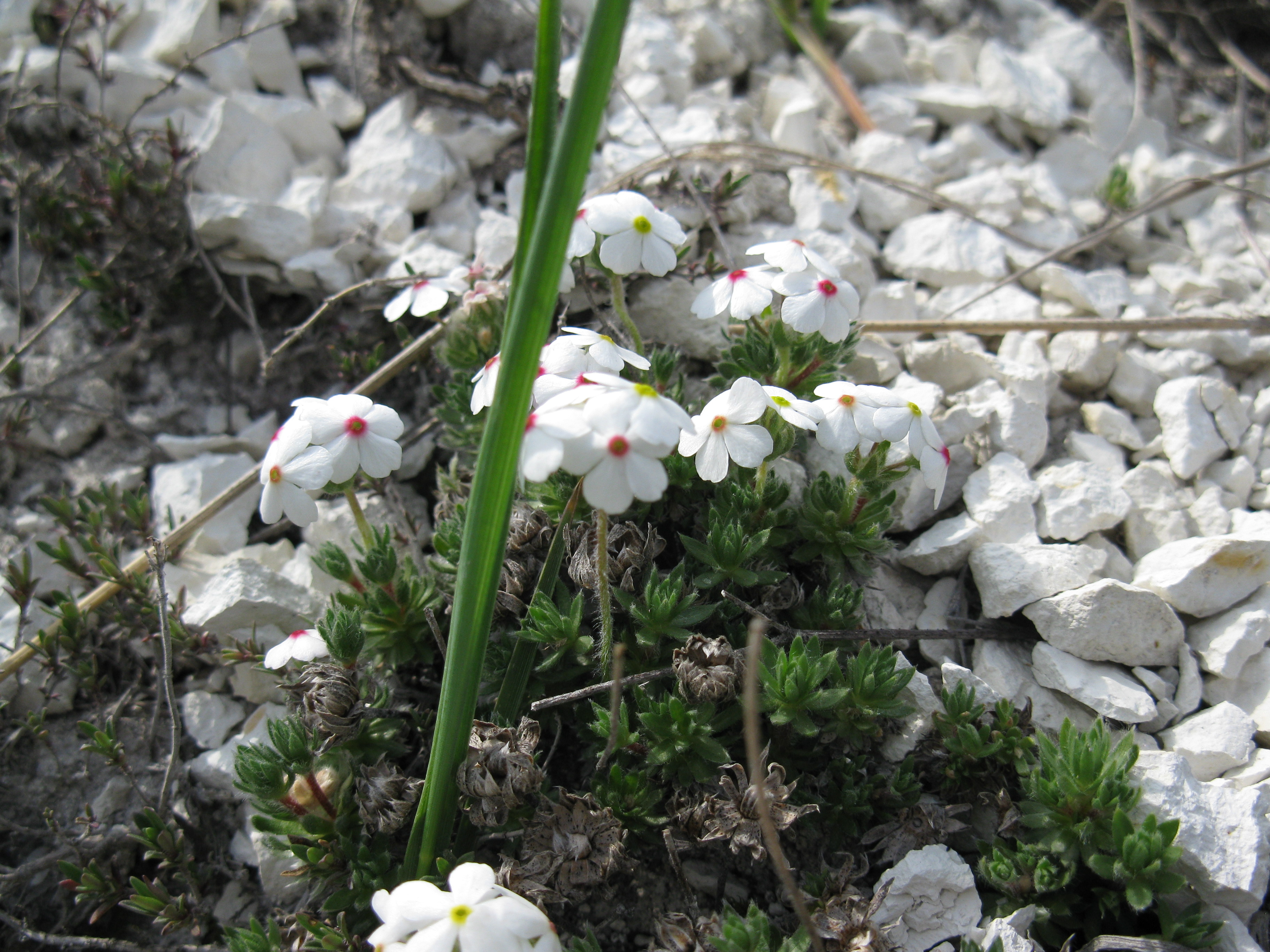 Проломник, растущий в мелу